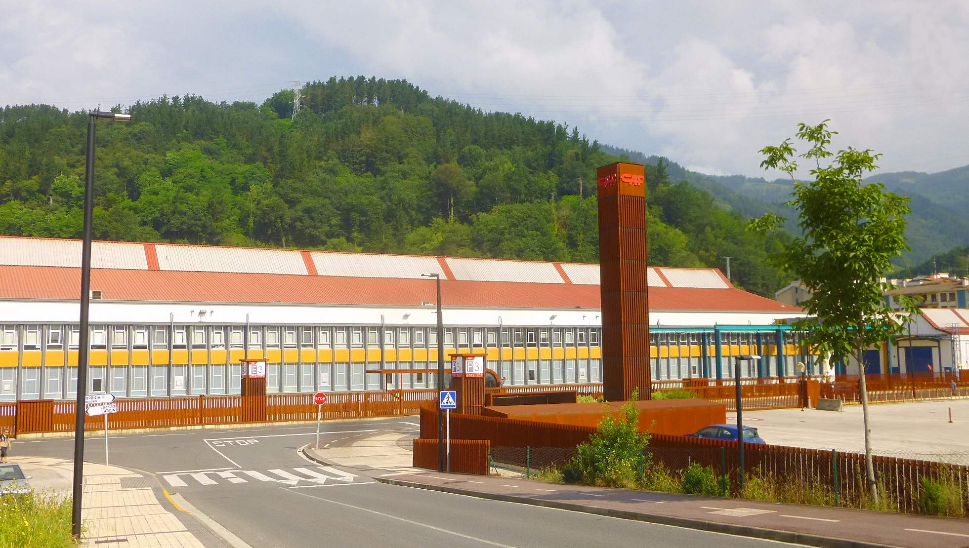 Fábrica de Construcciones y Auxiliar de Ferrocarriles (CAF) en Beasain (Guipúzcoa)